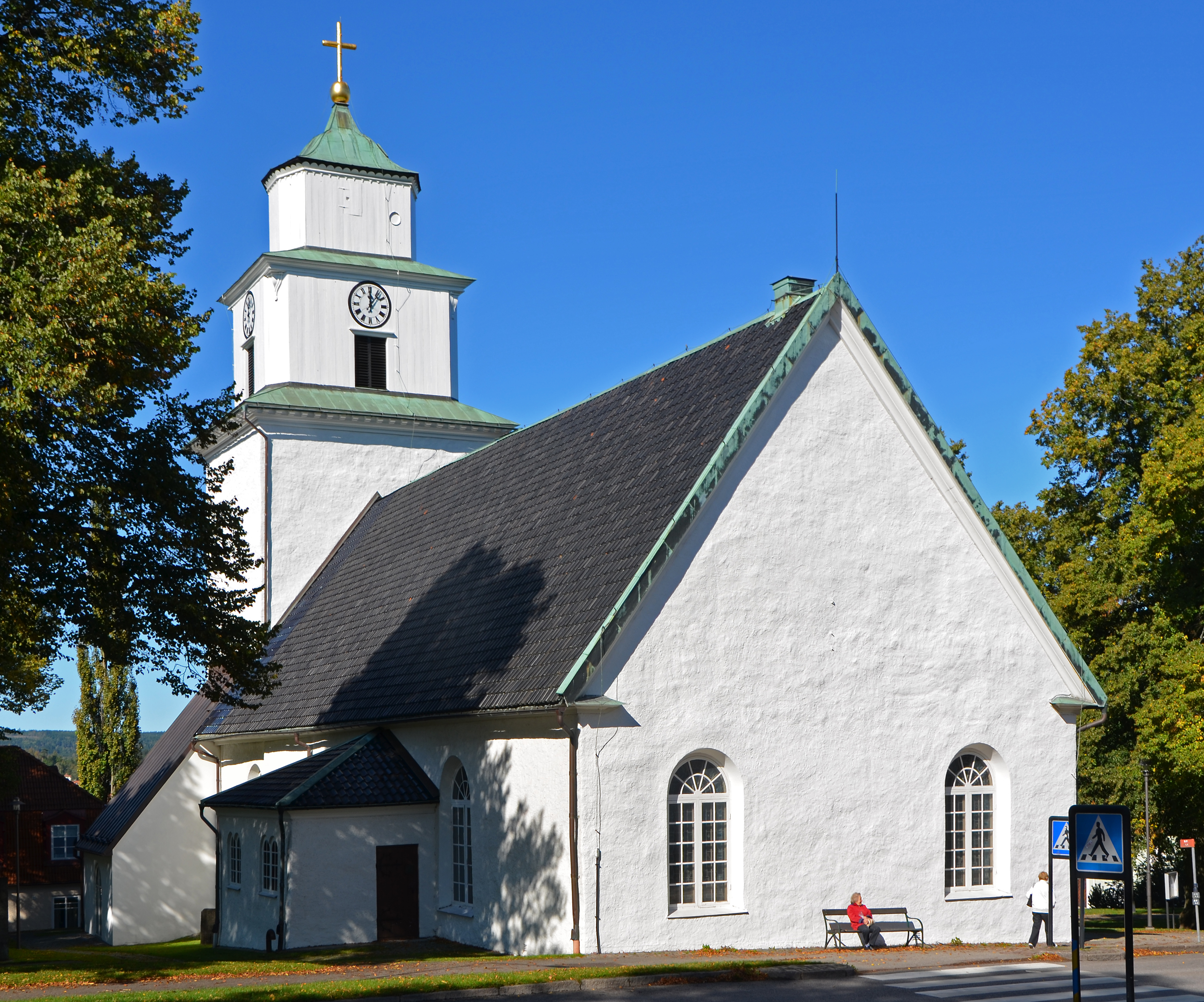 Ulricehamn kyrka